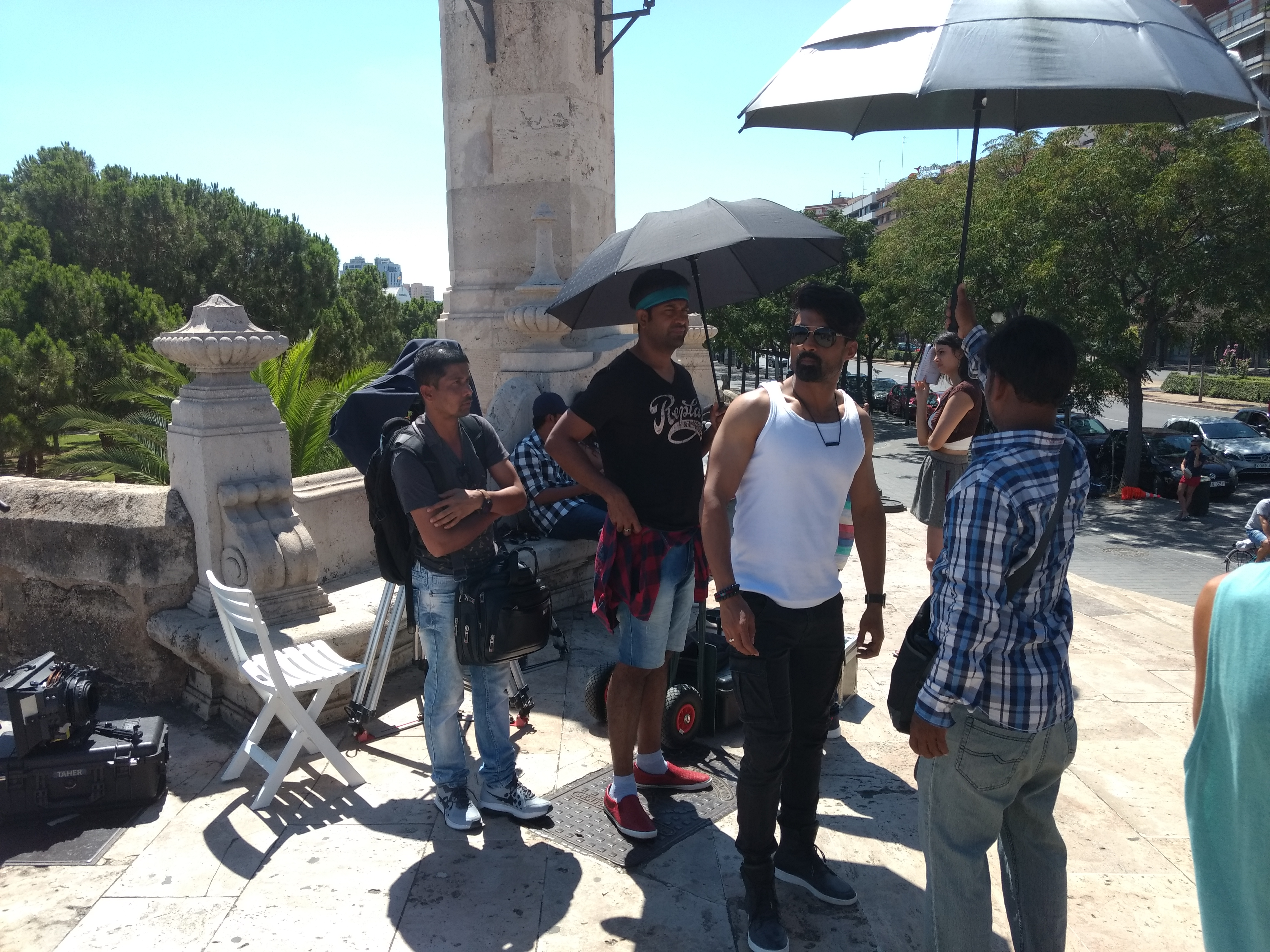 Esperant al començament del rodatge d'una escena al Pont del Real de València. Protagonista masculí sent protegit del sol.